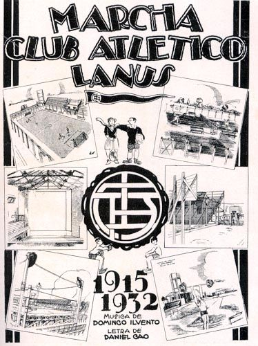 Cover of an illustrated phamflet containing the anthem of Argentine Club A. Lanús